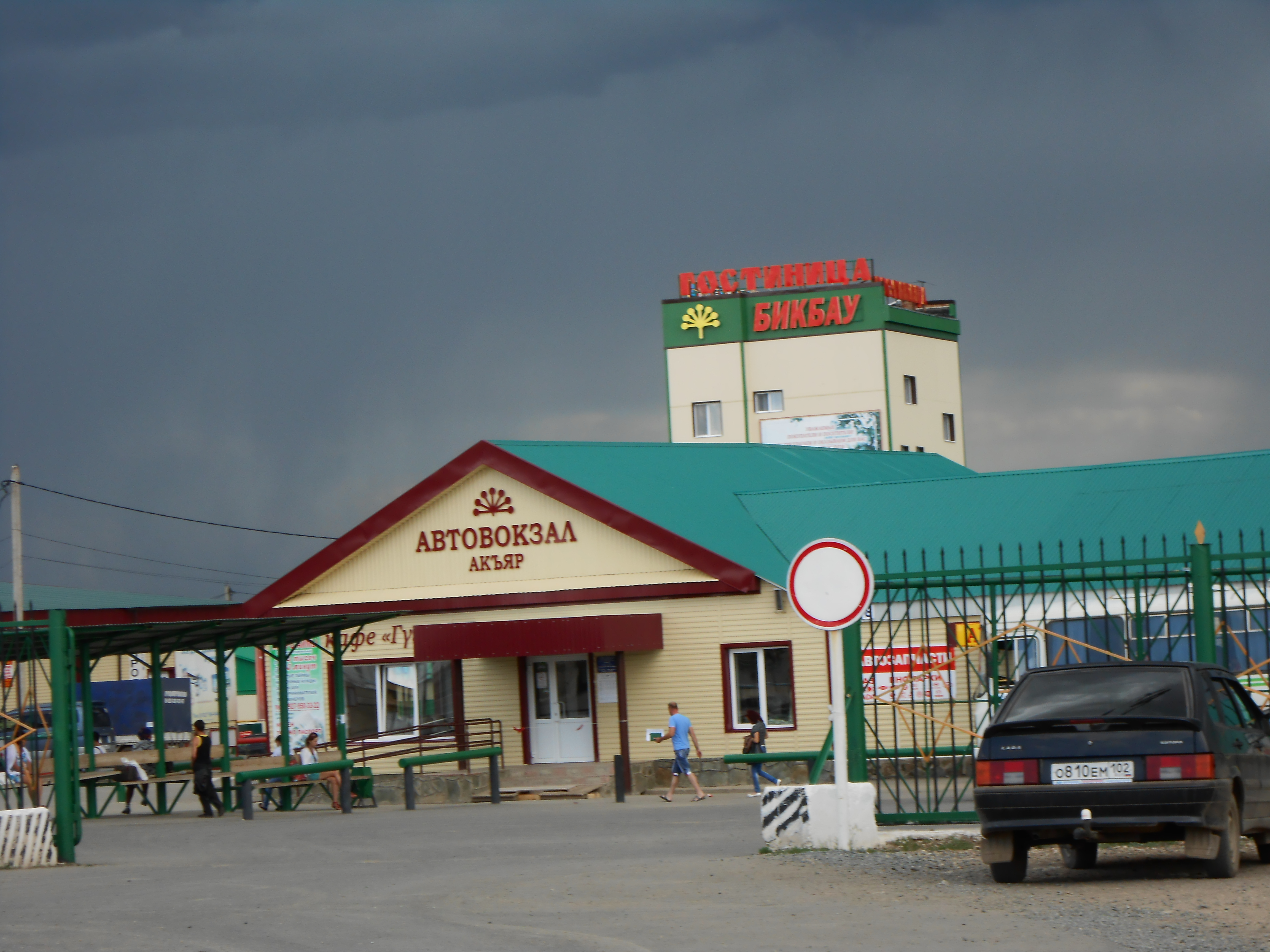 Автовокзал в с.Акъяр Хайбуллинского района РБ